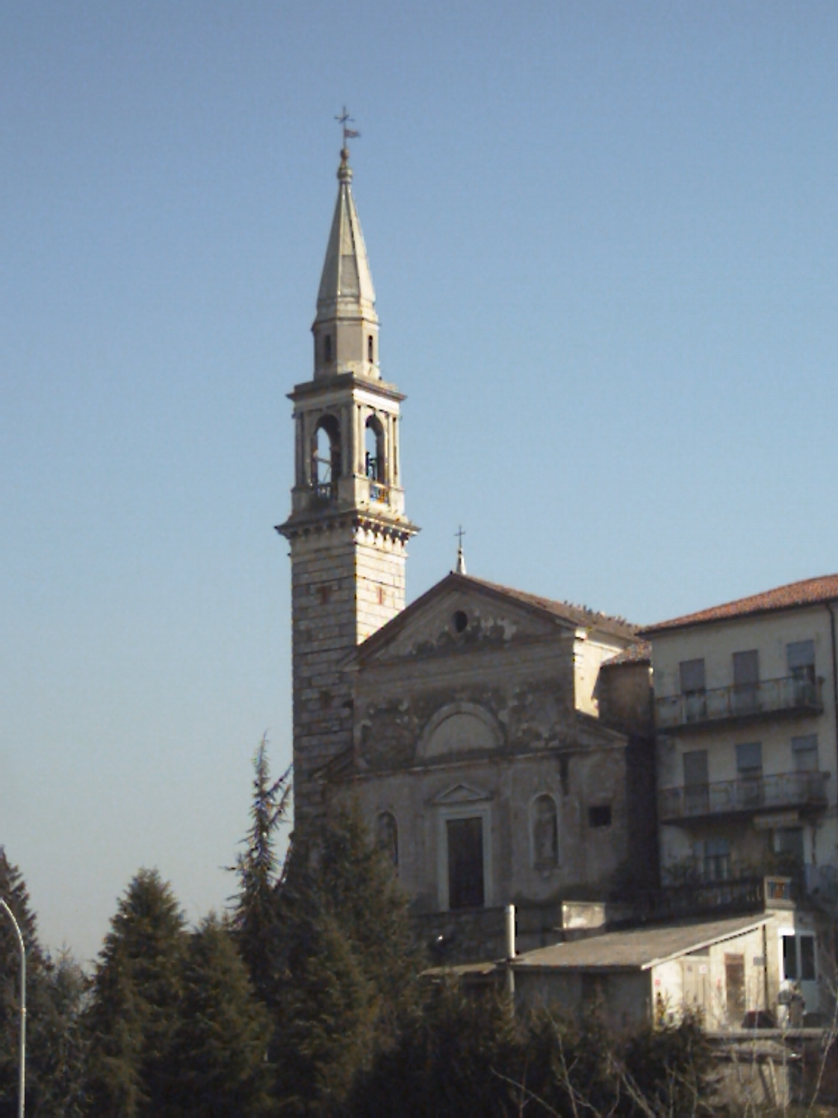 Pieve Battesimale con moderna Casa di Riposo annessa